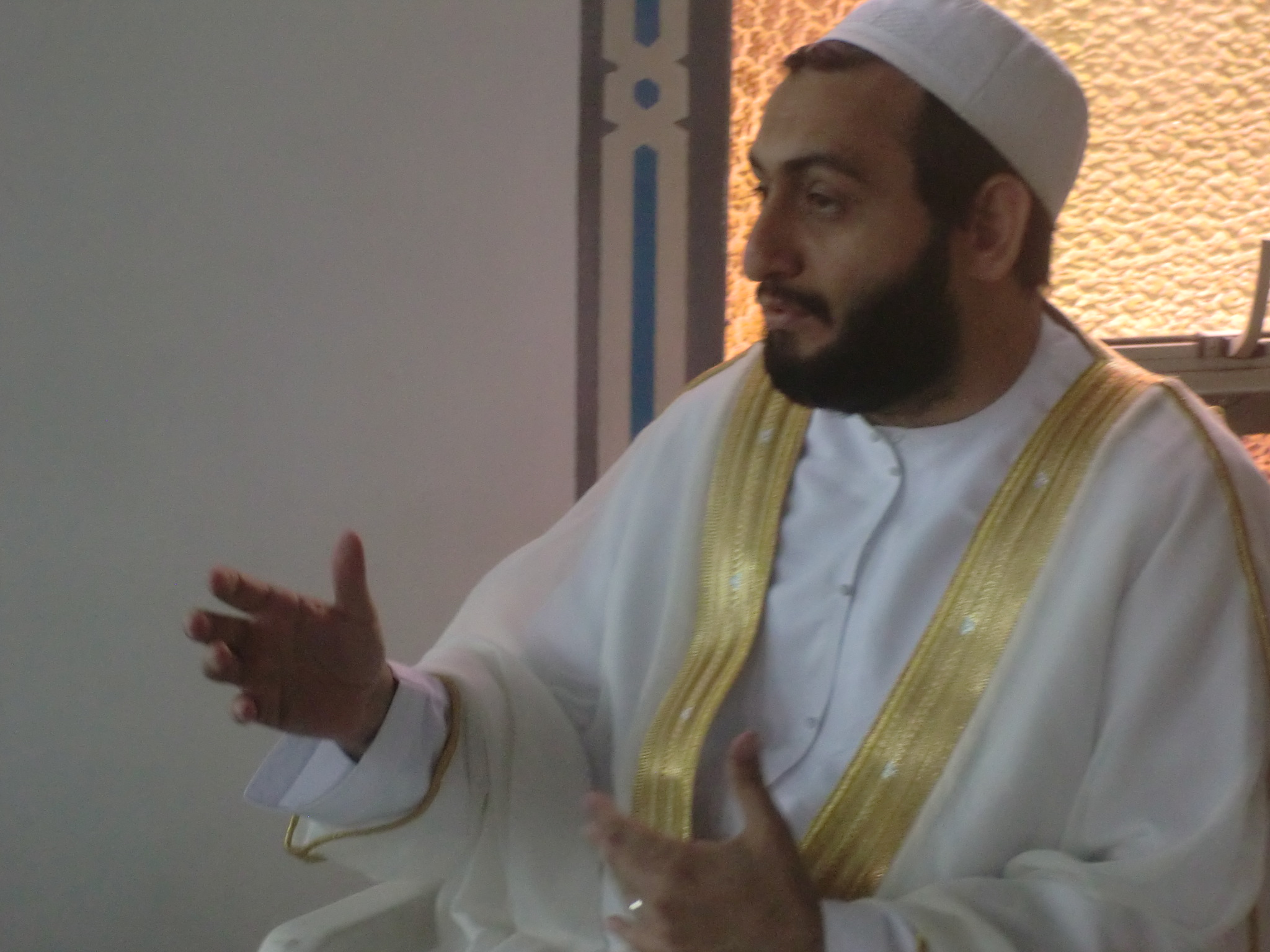 Entrevista com o Sheik